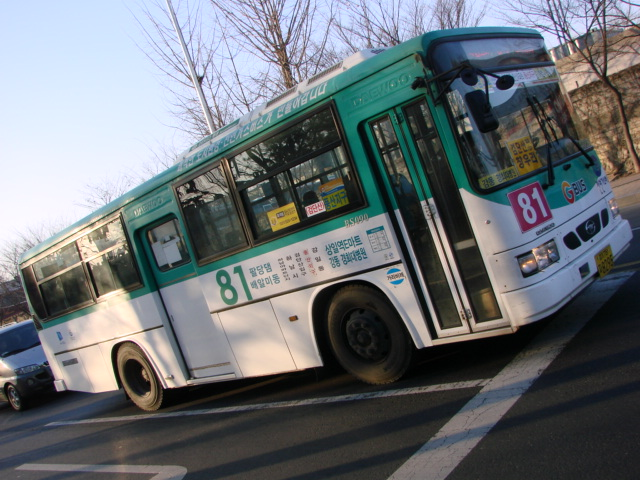 경기도 버스 16번